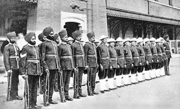 1906年的香港警察，包括印籍及華籍警員，在中區警署前